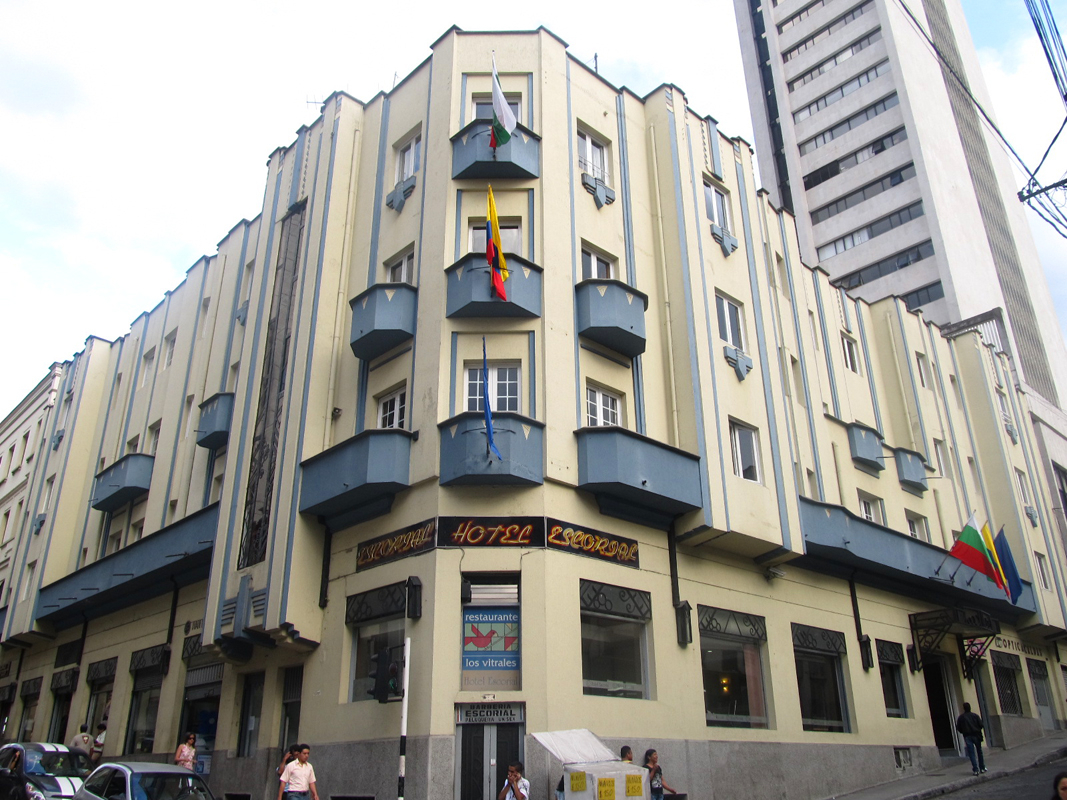 Conjunto de Inmuebles de Arquitectura Republicana localizados en el Centro de Manizales